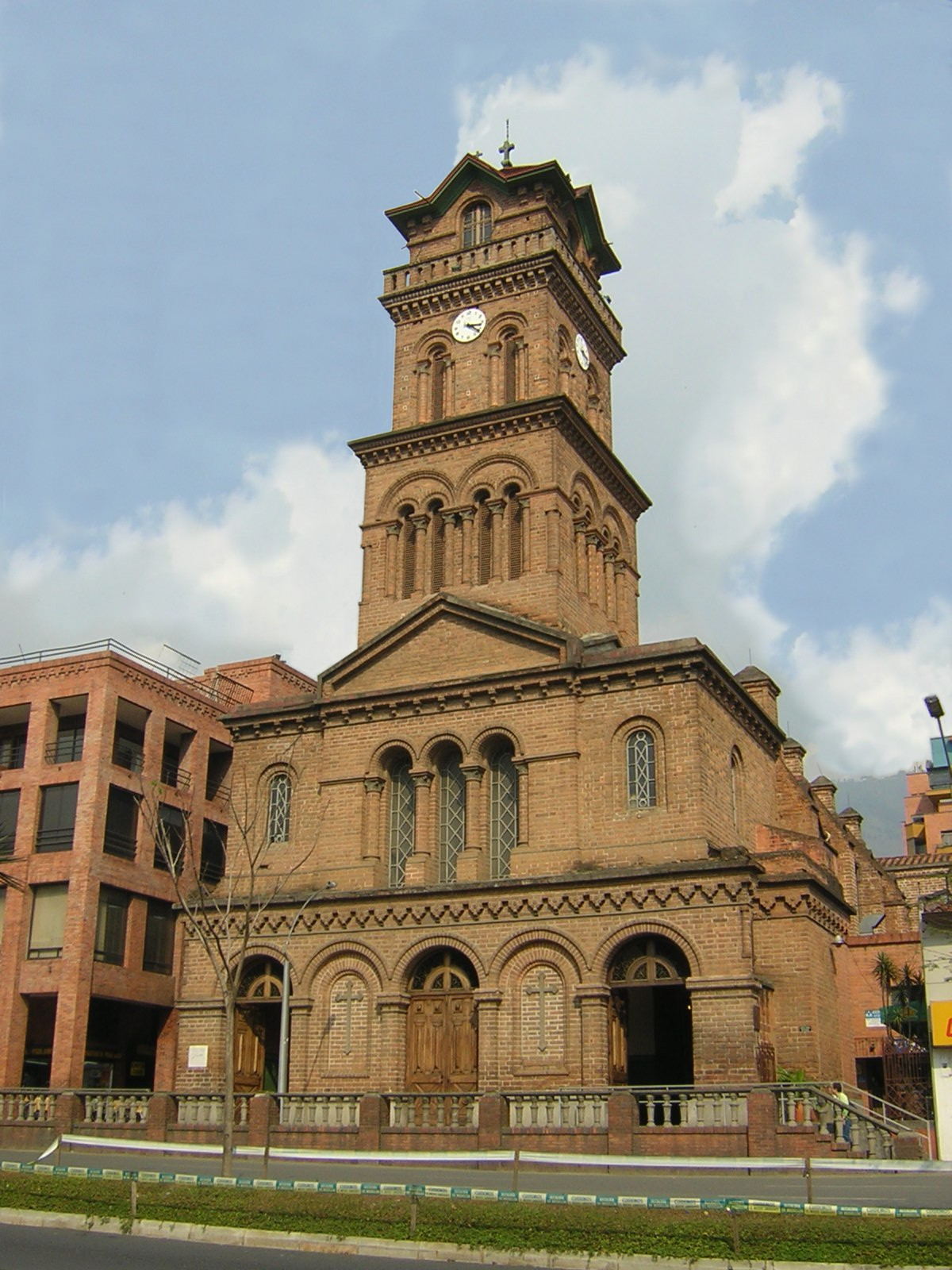 Iglesia de San José del Poblado, ubicado en el Parque del Poblado, Medellín, Colombia.